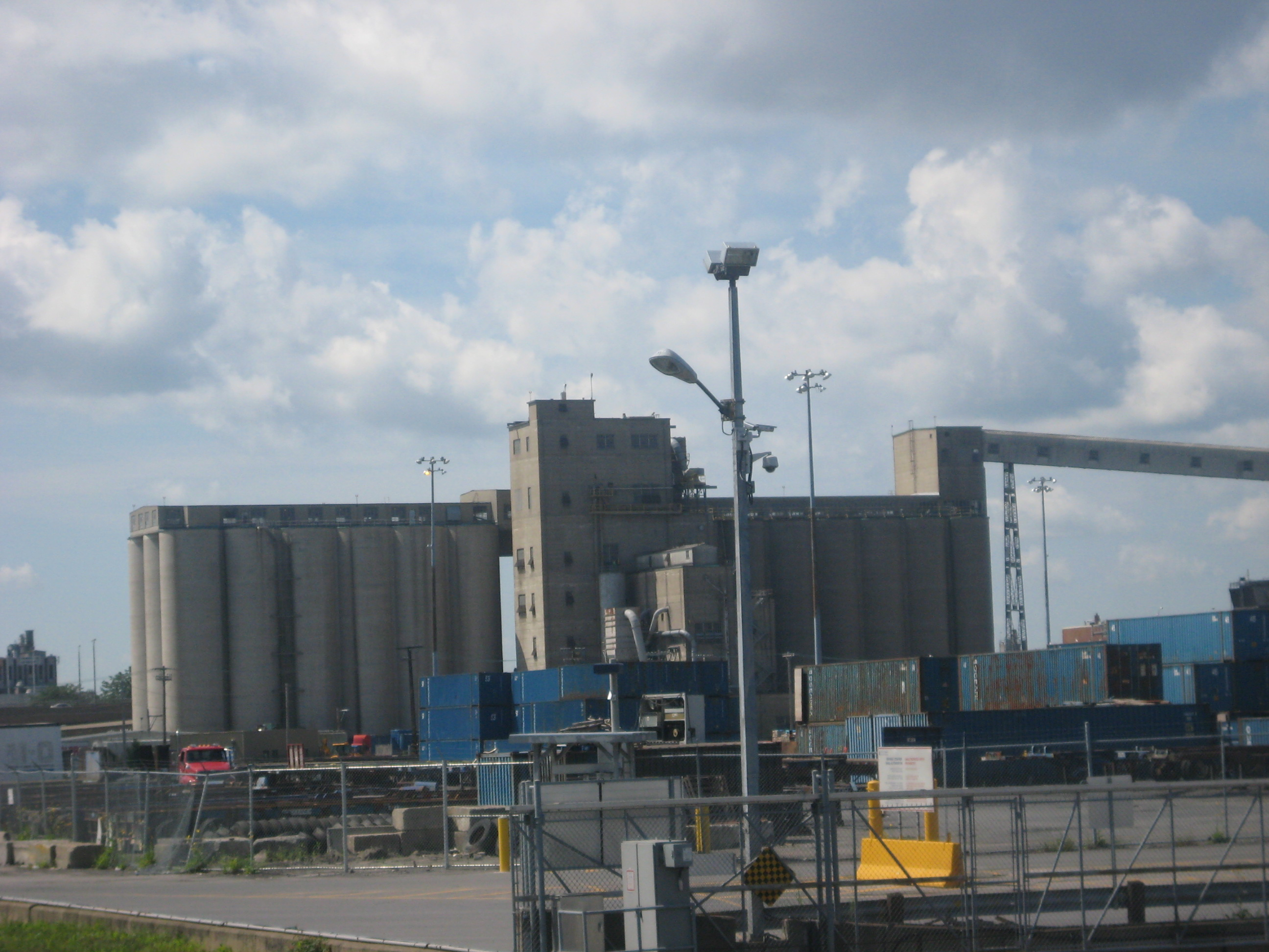 Silo Canada Maltage de Montréal vue de la Rue Pierre Dupuy. En arrière du silo, il s'agit de l'Autoroute Bonaventure.